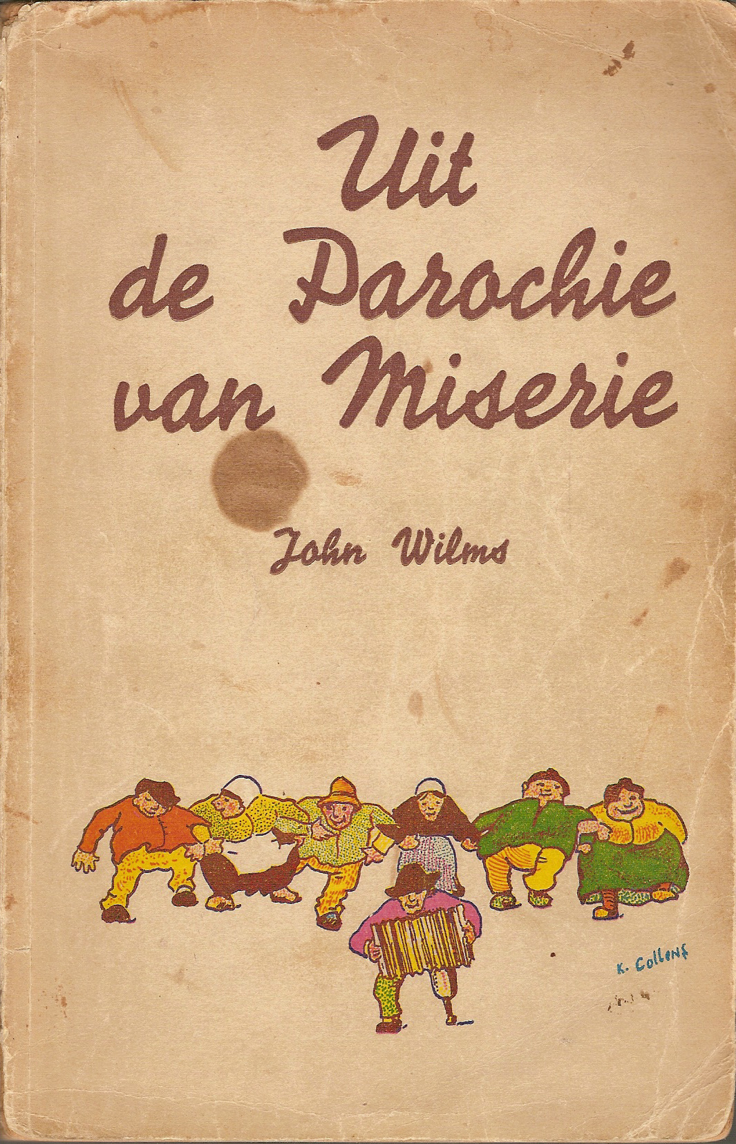 Cover van boek Uit de parochie van miserie, van Antwerps schrijver John Wilms (2de druk, 1942).